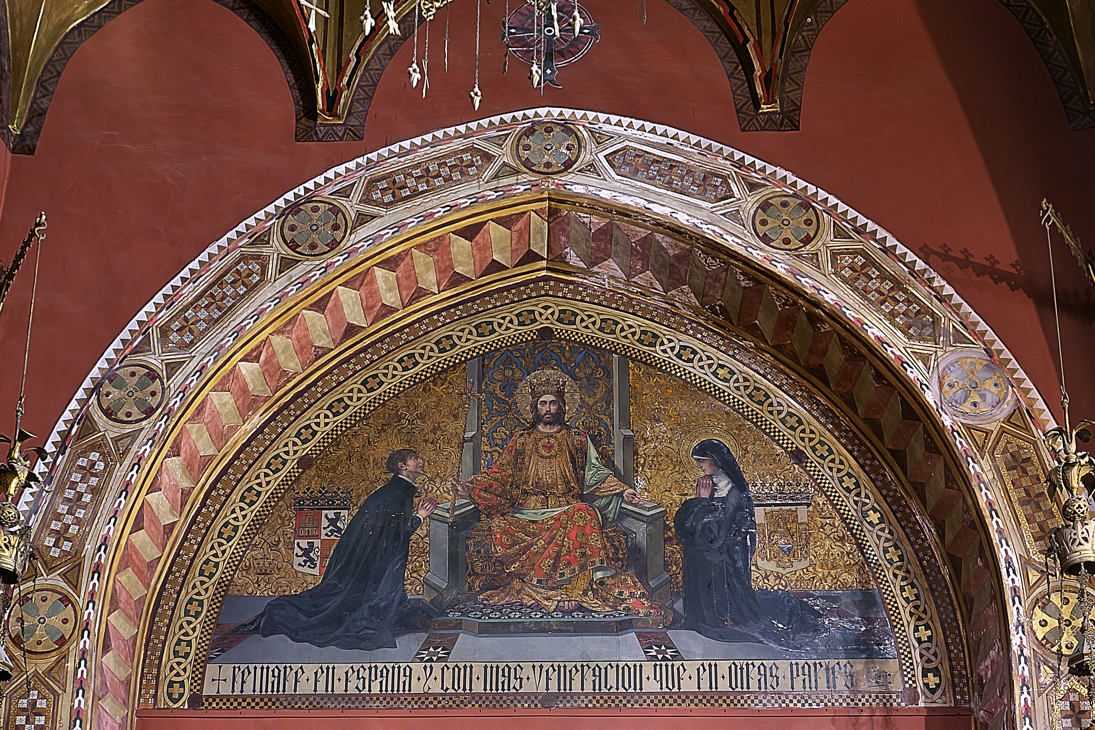 Iglesia de San Andrés (Sevilla). Capilla del Sagrado Corazón de Jesús, pintura mural de Virgilio Mattoni de la Fuente (1904).